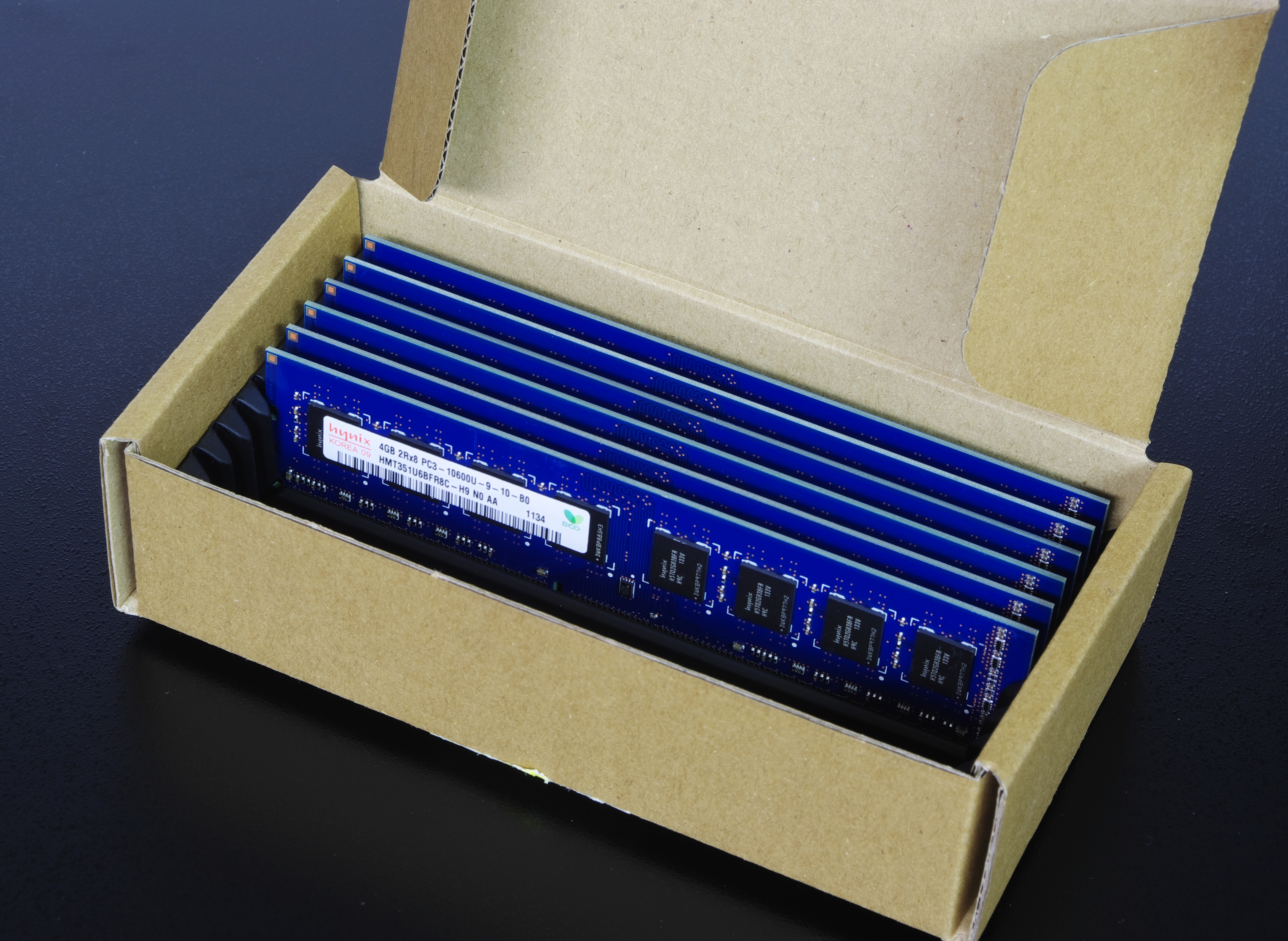 Transportverpackung für Speicher mit antistatischem Einsatz